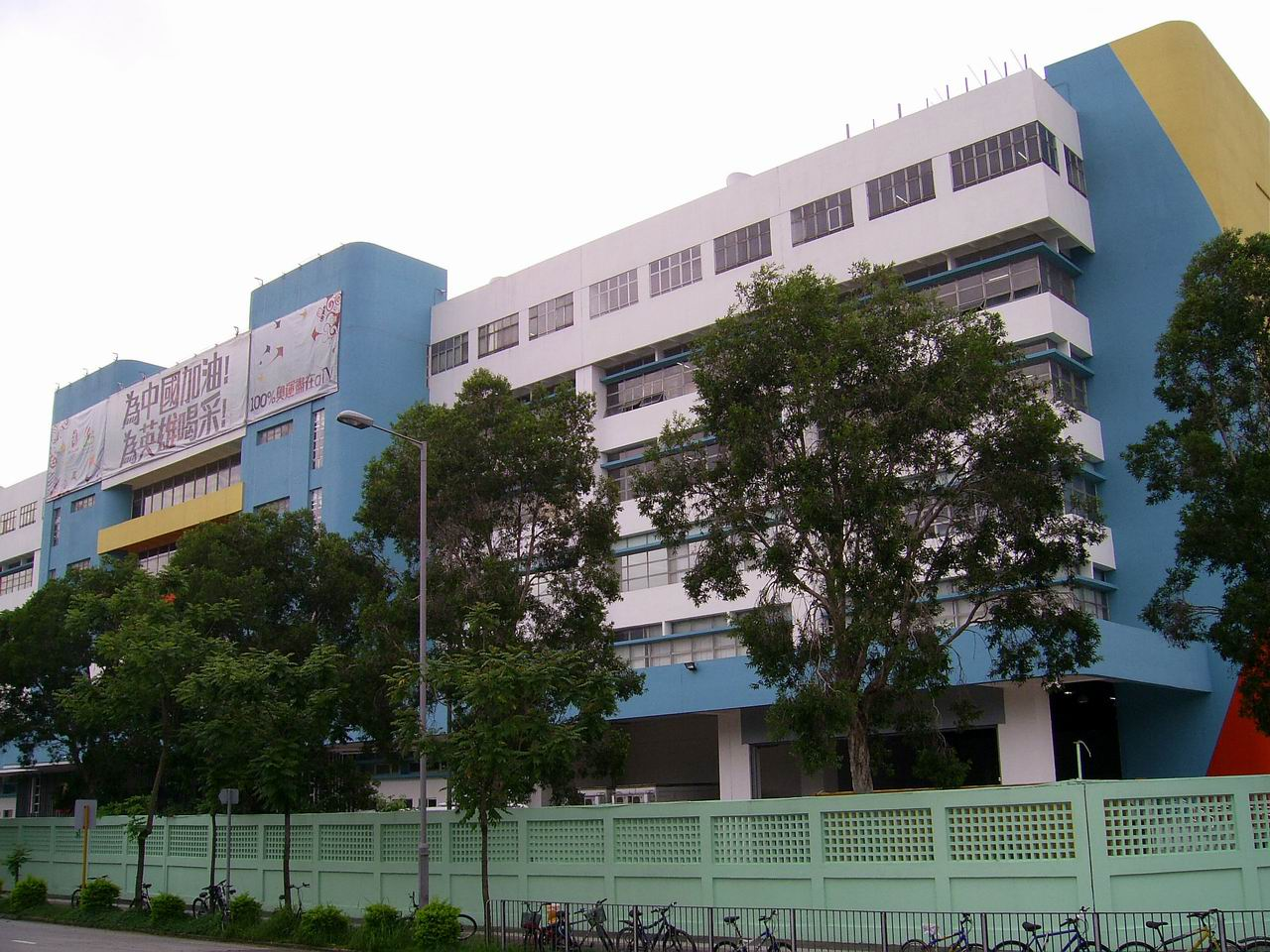 中文（香港）: 大埔工業園亞洲電視